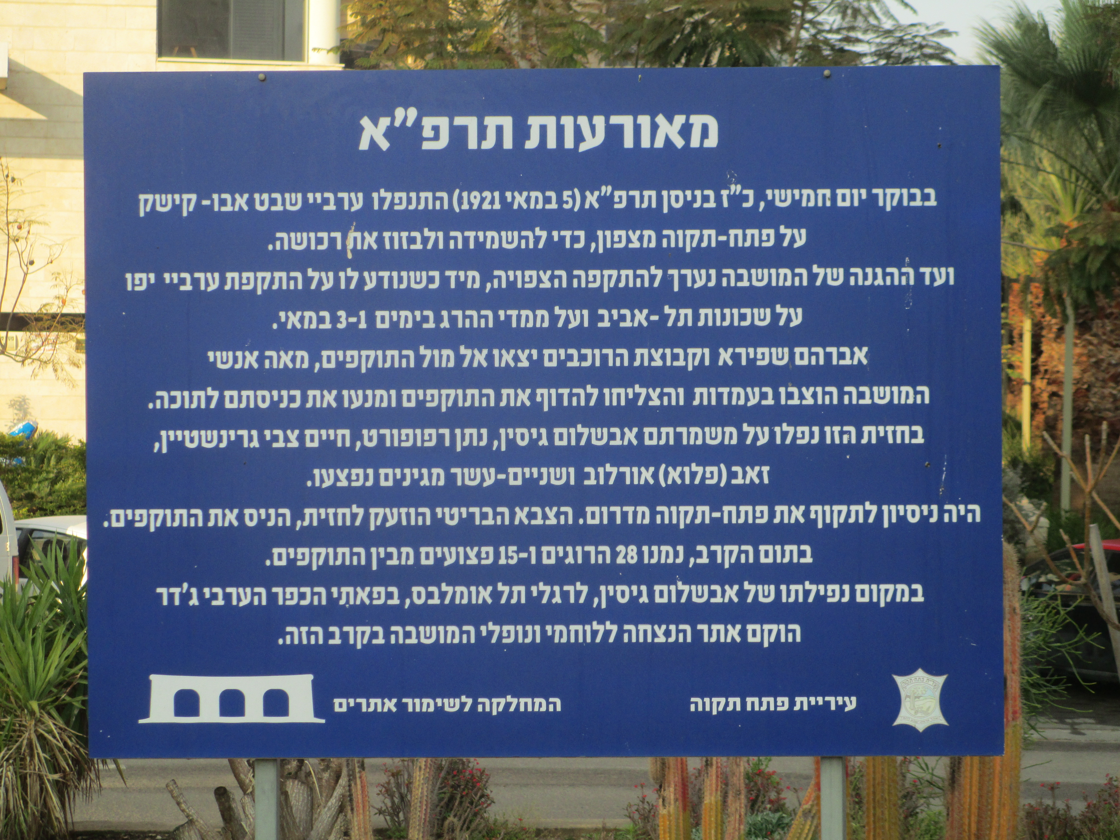 שלט הסבר בכיכר הרעות בשכונת אם המושבות בפתח תקווה